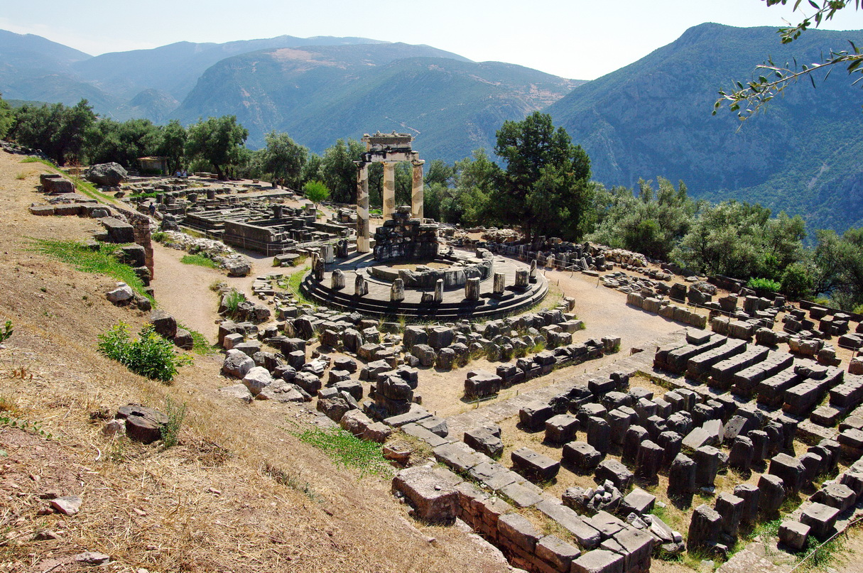 Delphi, Athena Pronaia, Übersicht